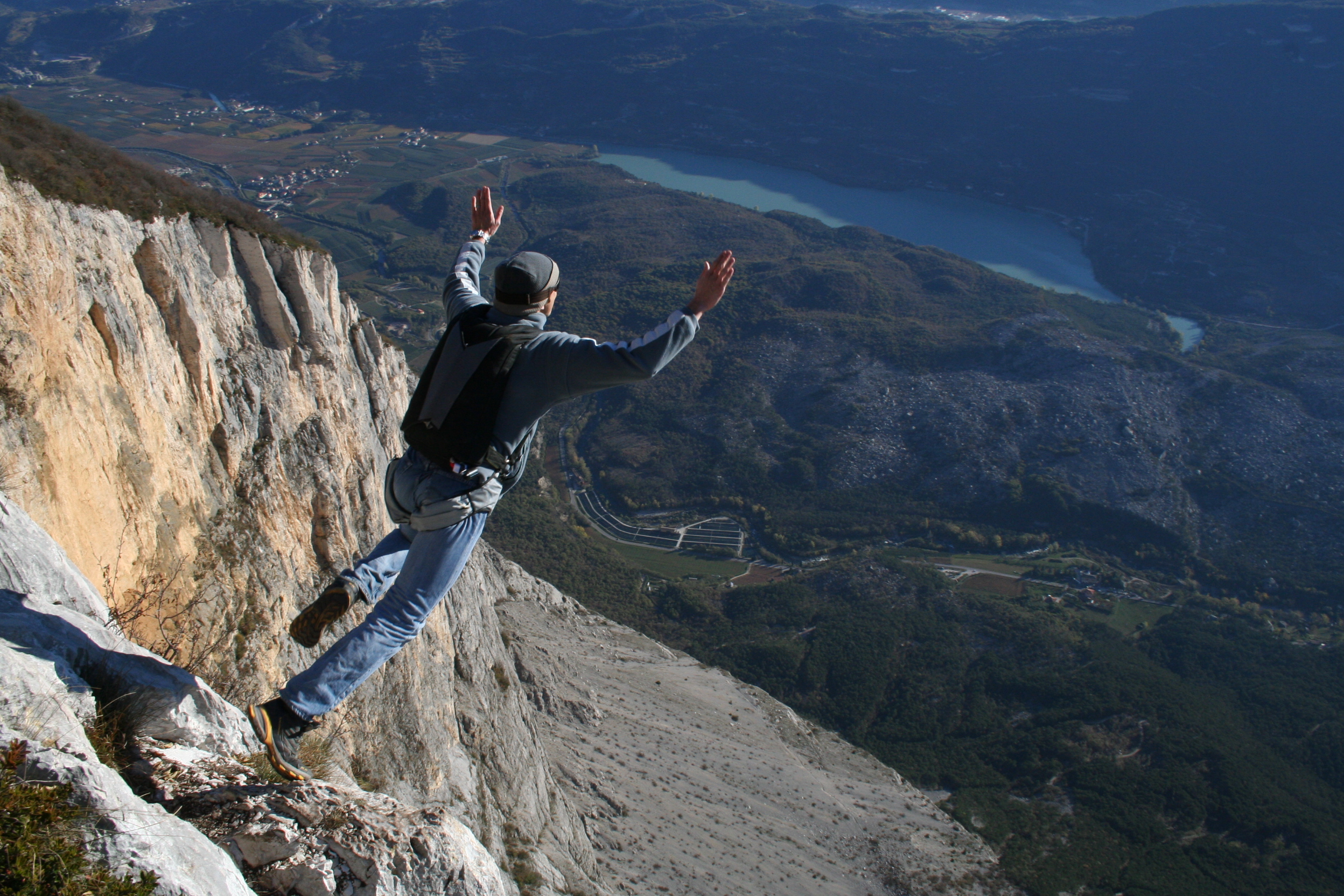 Saut de Base Jump depuis une des plus hautes falaises d'Europe : le Mont Brento en Italie. 900 mètres, environ 15 secondes de chute libre. Licensing Source photographie prise en novembre 2006. je suis l'auteur et j'ai l'accord du parachutiste.